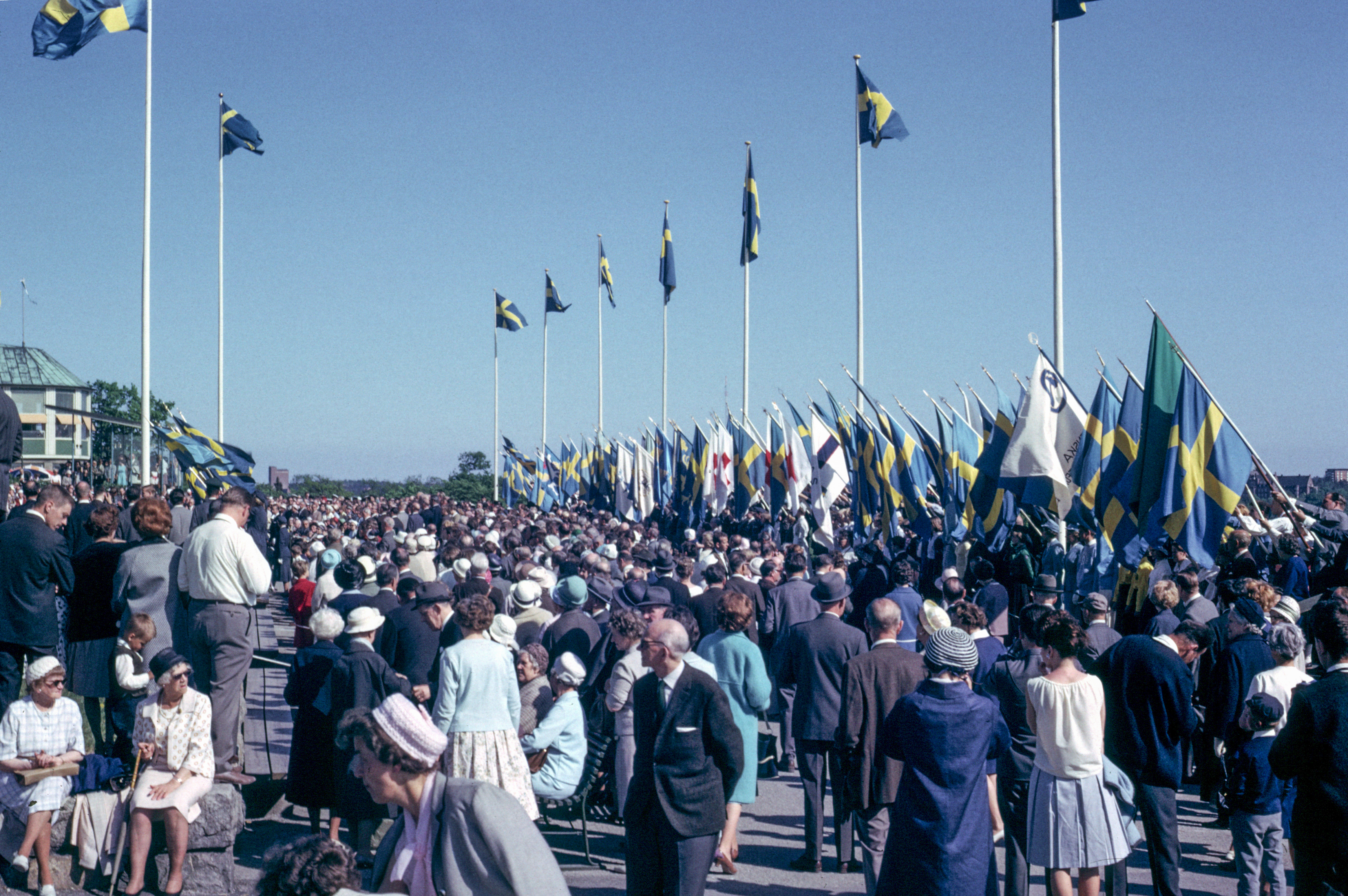 swedish flag day skansen